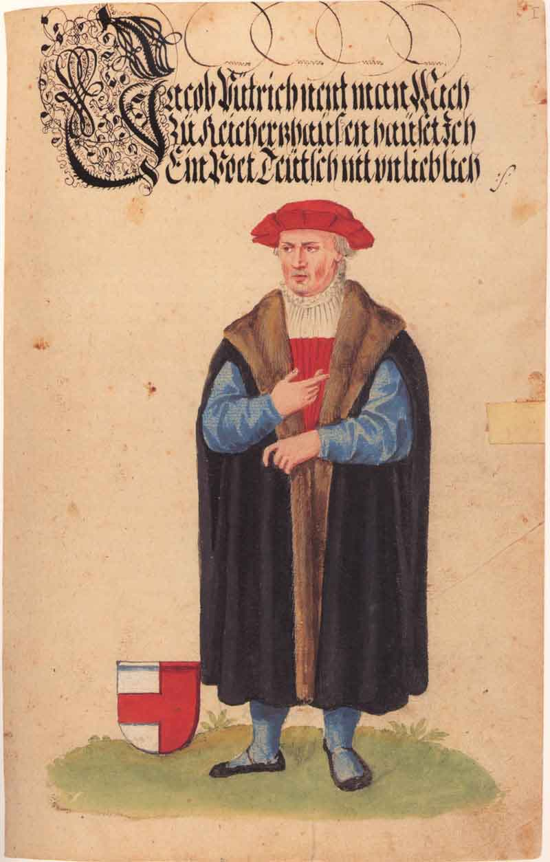 Jacob Püterich von Reicherzhausen (Reichertshausen)